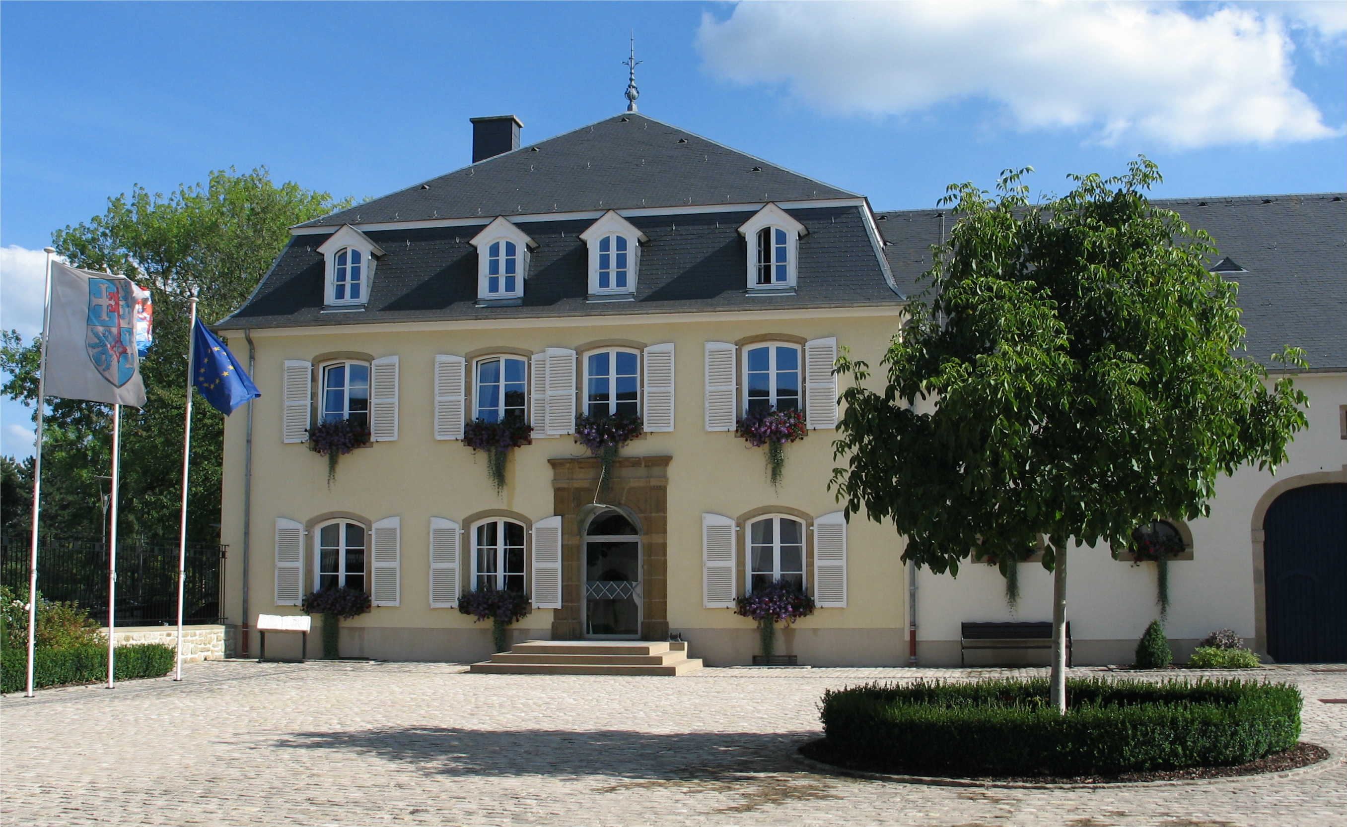 La maison communale de Betzdorf (Luxembourg)